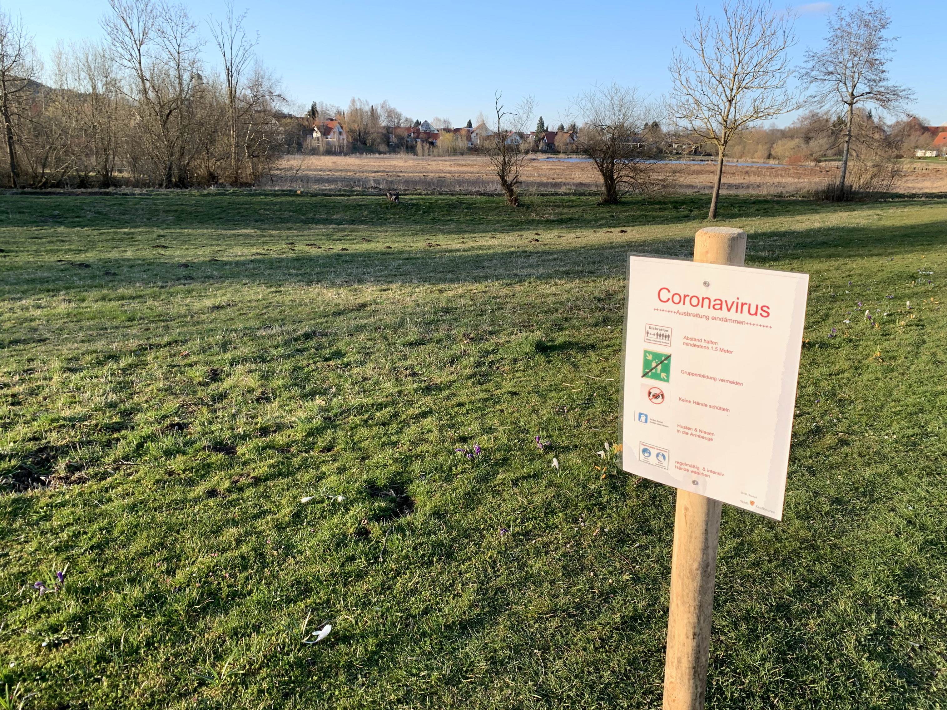 Ein Warnschild zum Coronavirus in Kaufbeuren